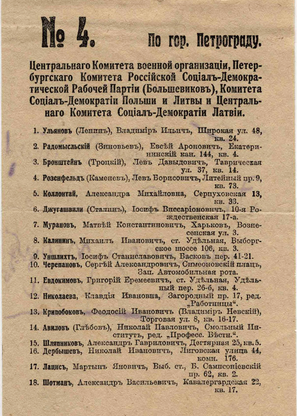 Избирательный бюллетень по голосованию во Всероссийское учредительное собрание, 1917